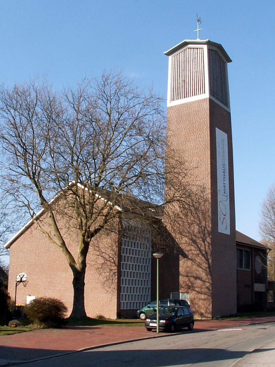 ev.-luth. Matthäuskirche in Osnabrück, Stadtteil Sonnenhügel, Ansicht von Südosten